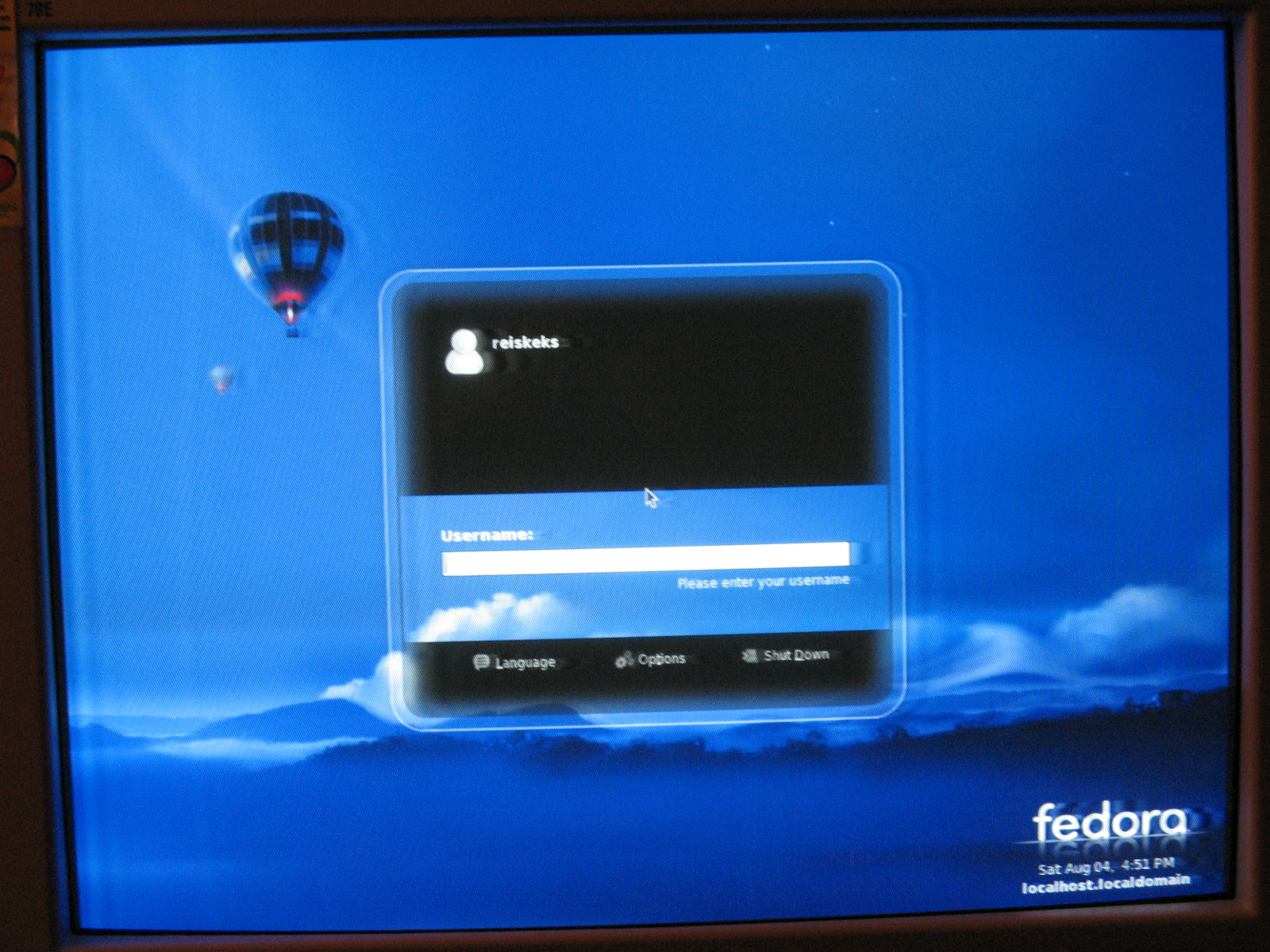 Fedora 7 Login